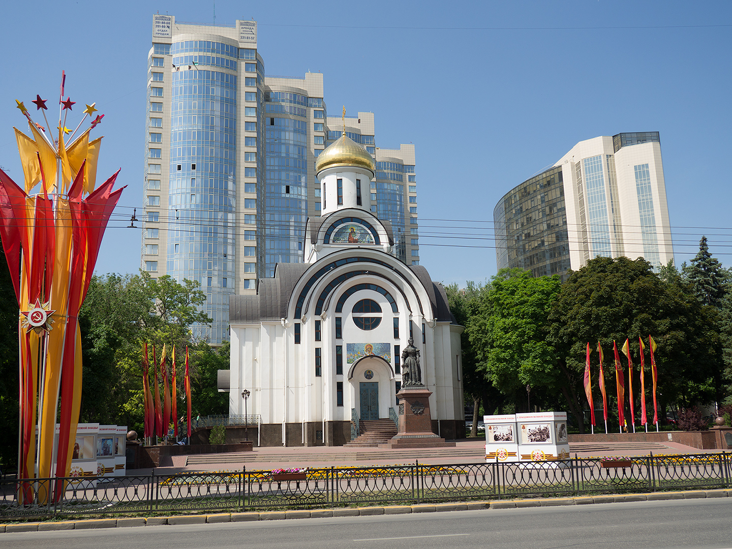 Ростов-на-Дону: сквер Покровский: храм Покрова Пресвятой Богородицы, памятник императрице Елизавете Петровне; 28.05.2015